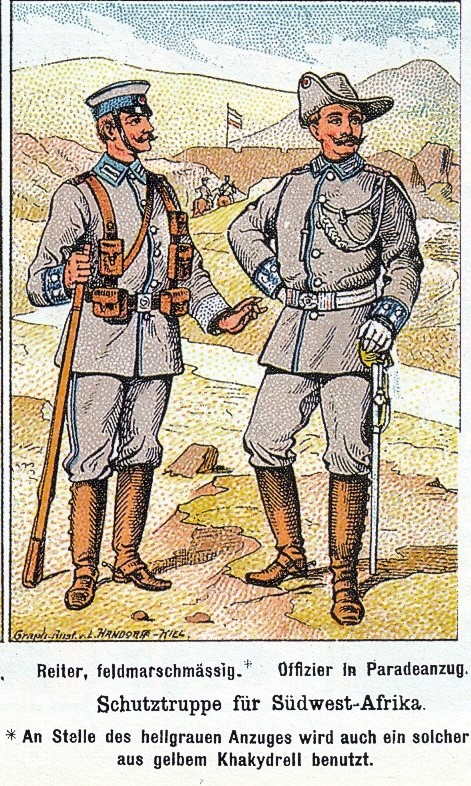 Uniformen der deutschen Schutztruppen für Südwest-Afrika